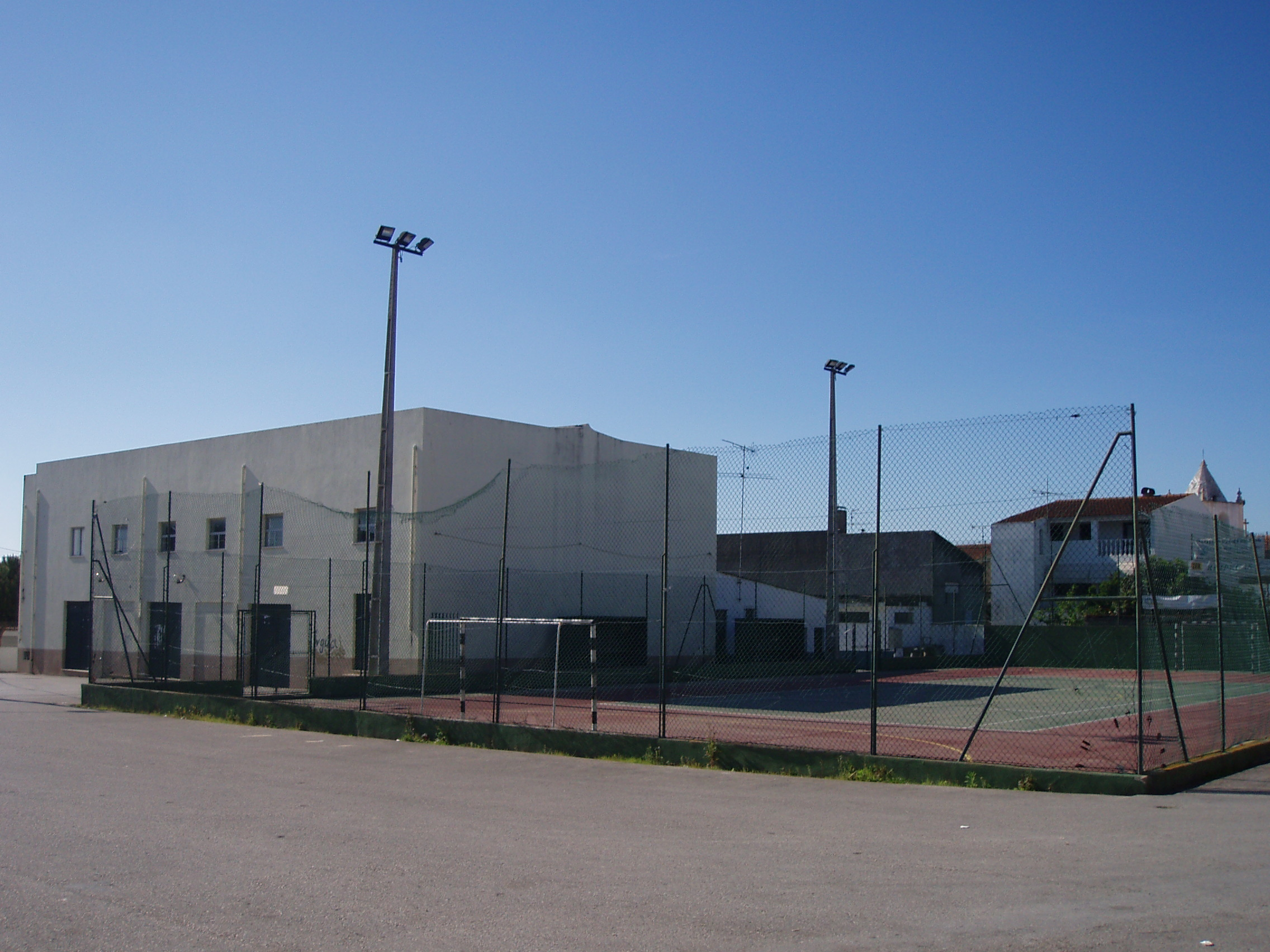 Associação da Granja do Ulmeiro e Polidesportivo